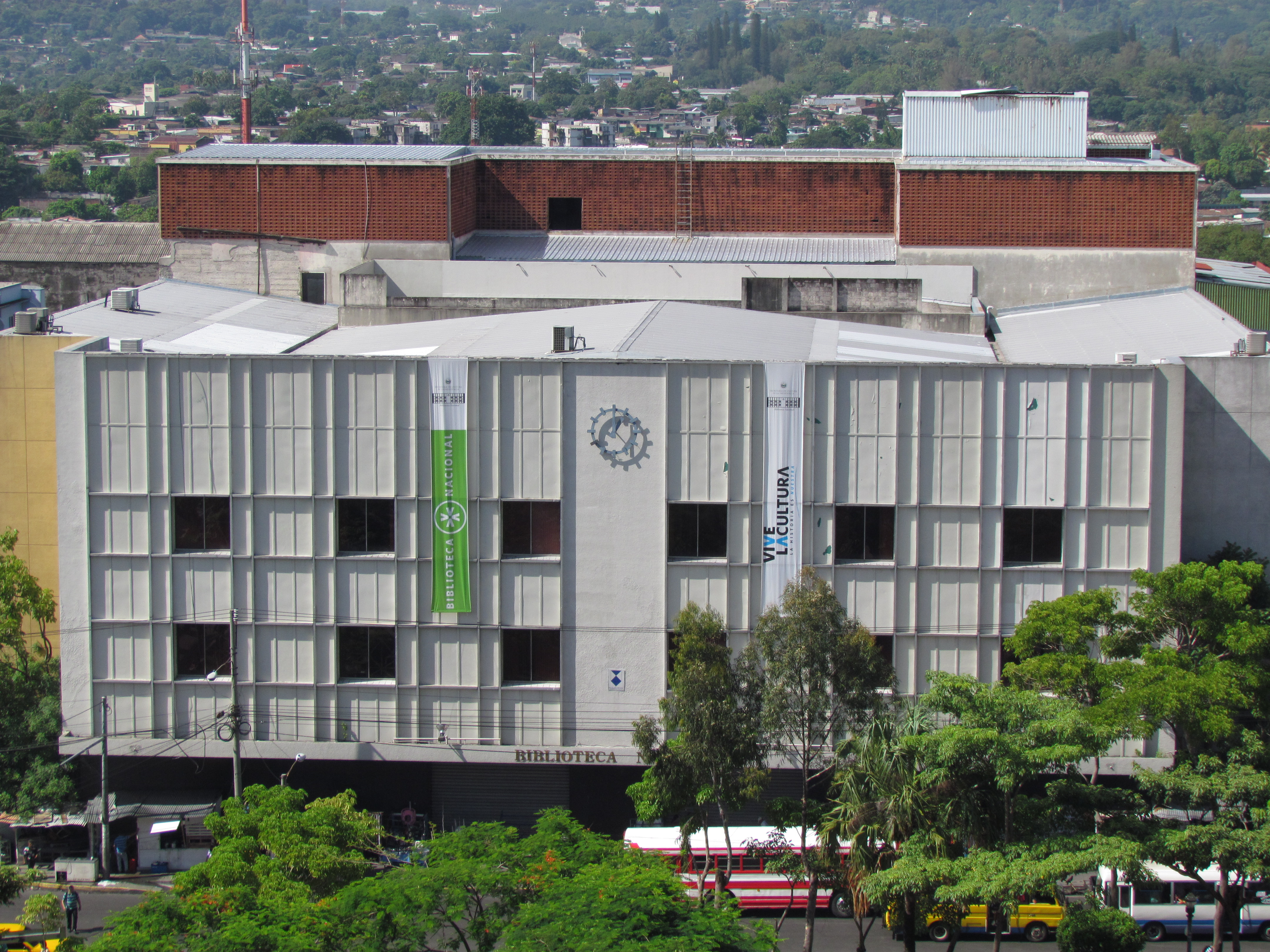 Biblioteca Nacional de El Salvador vista desde la Catedral de San Salvador